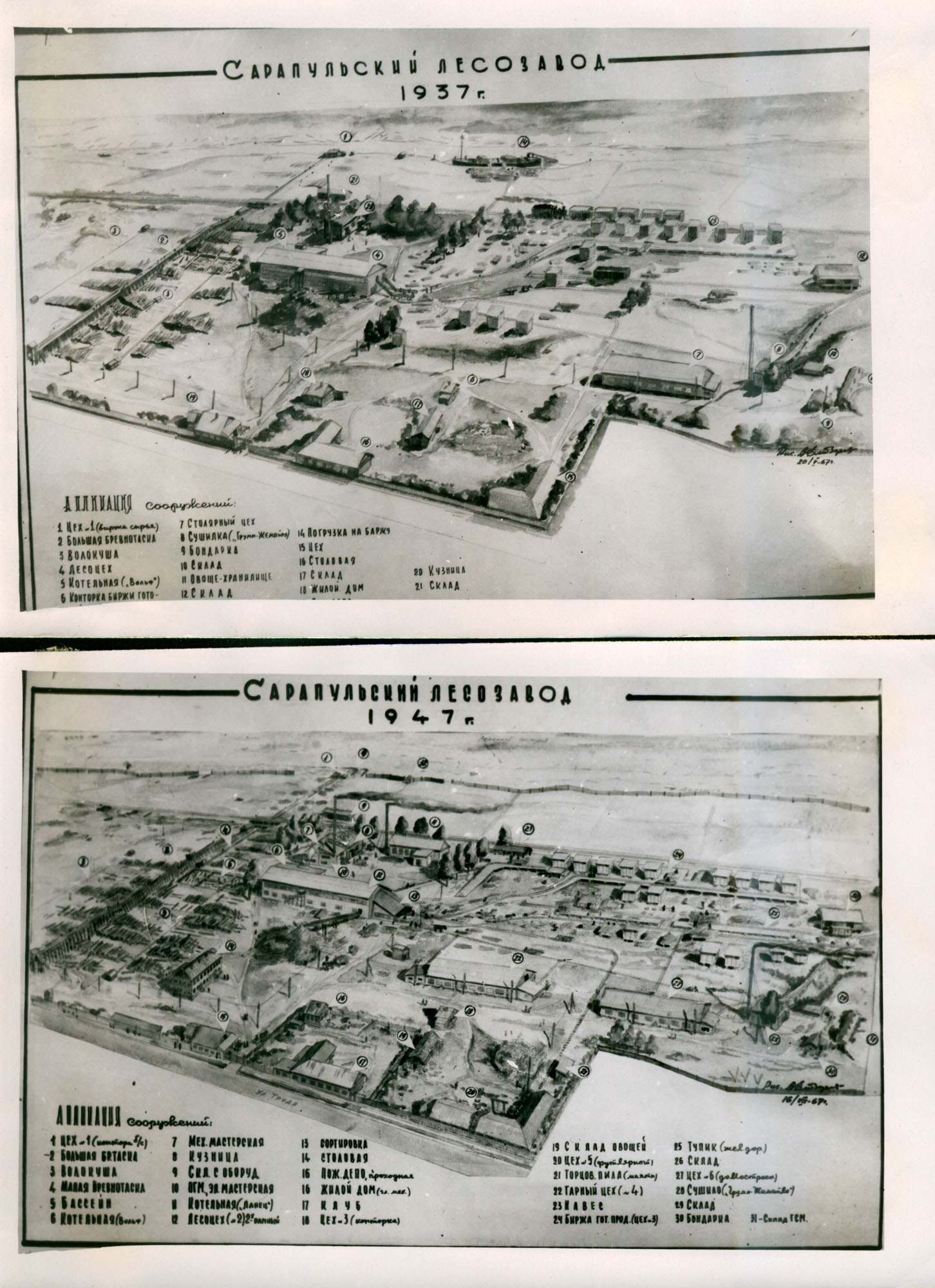 Сарапульский лесозавод, 1937г., 1947 г.